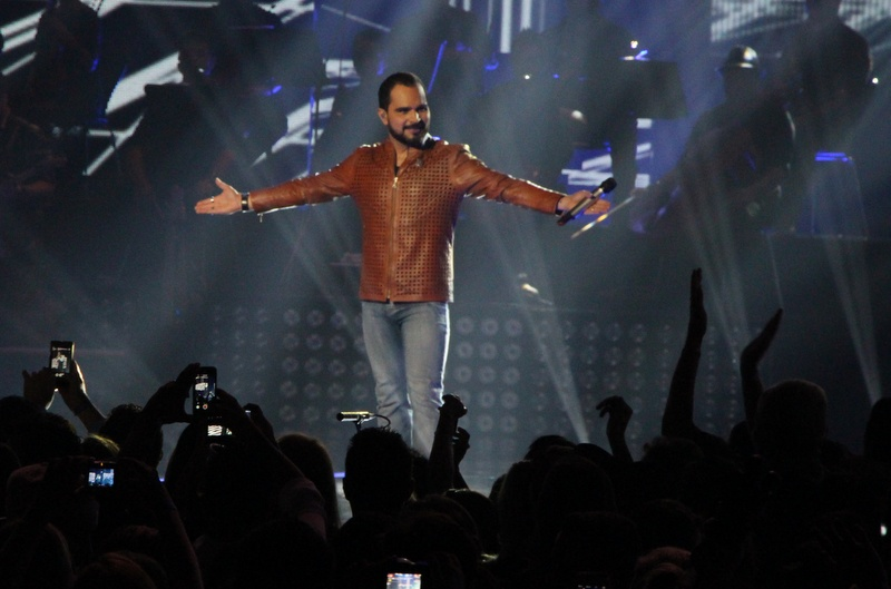 Zeze di Camargo e Luciano-030